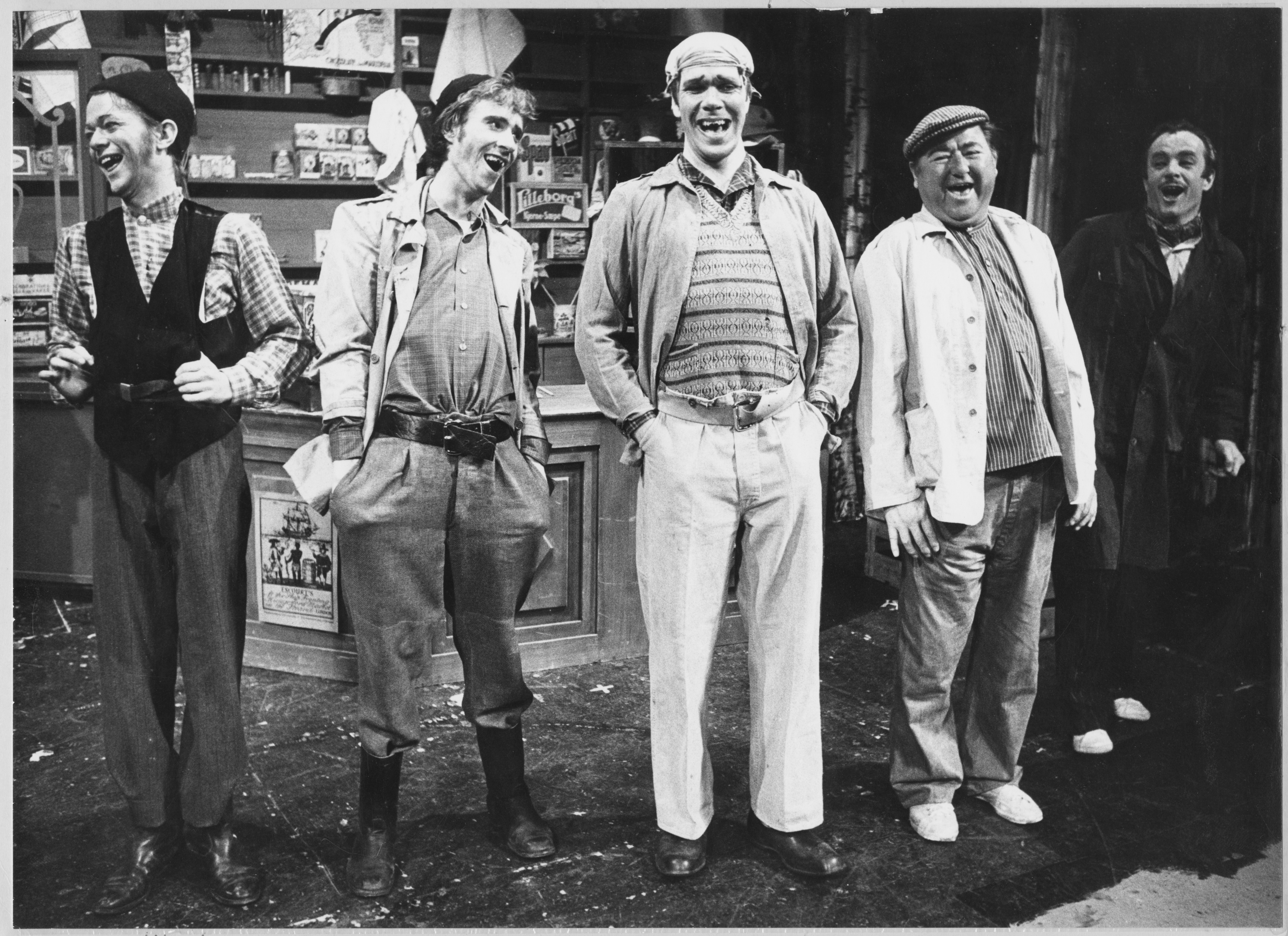 Snekkersve-kara fra Trøndelag teaters oppsetning av musikalen Trost i taklampa. Tekst: Alf Prøysen og Asbjørn Toms. Musikk: Finn Ludt. Premieredato 9. mai 1975. Fra venstre: Trond Lie (Teodor Snekkersveen), Geir Nergaard (Valdemar Snekkersveen), Harald Brenna (Gustav Snekkersveen), Carsten Byhring (Aksel Snekkersveen). Helt til høyre handelsbetjenten Roy (Jan Erik Berntsen)